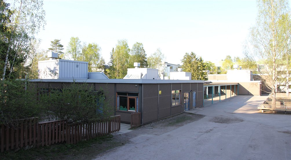 Mårtensdals skola on Vantaan Myyrmäen suuralueen Martinlaakson kaupunginosassa toimivaruotsinkielinen alakoulu. Koulun osoite on (ruotsiksi) Bredbergsgränden 4, 01620 Vanda.